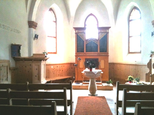 reformierte Kirche Tschierv, Kanton Graubünden